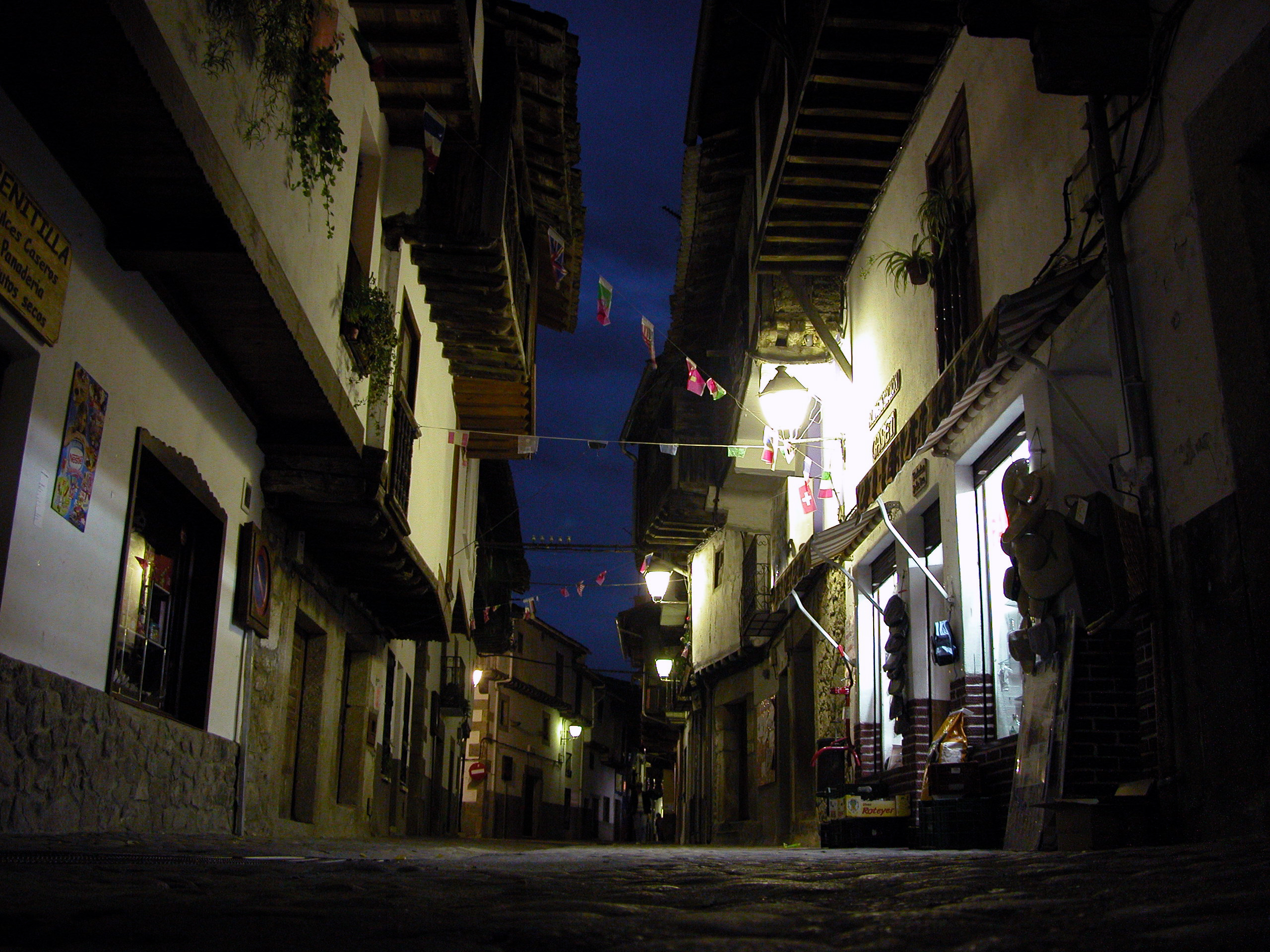 Villanueva de la Vera, por la noche